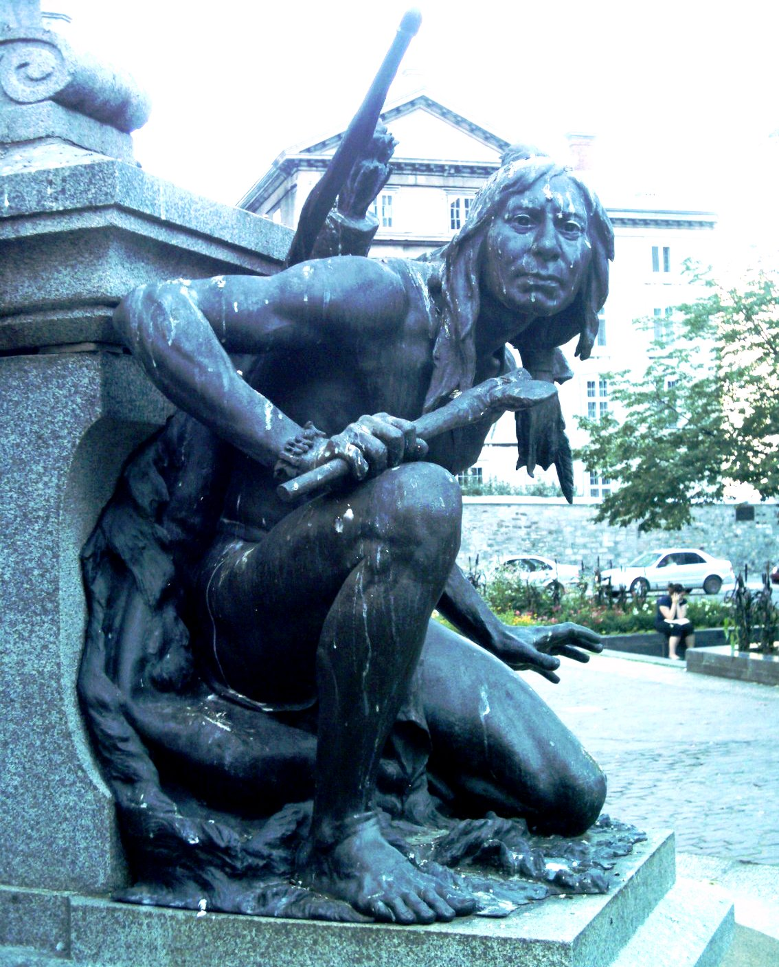 Iroquois, une des figures historiques du Monument à Maisonneuve, oeuvre de Louis-Philippe Hébert, 1895, Place d'Armes, Montréal.